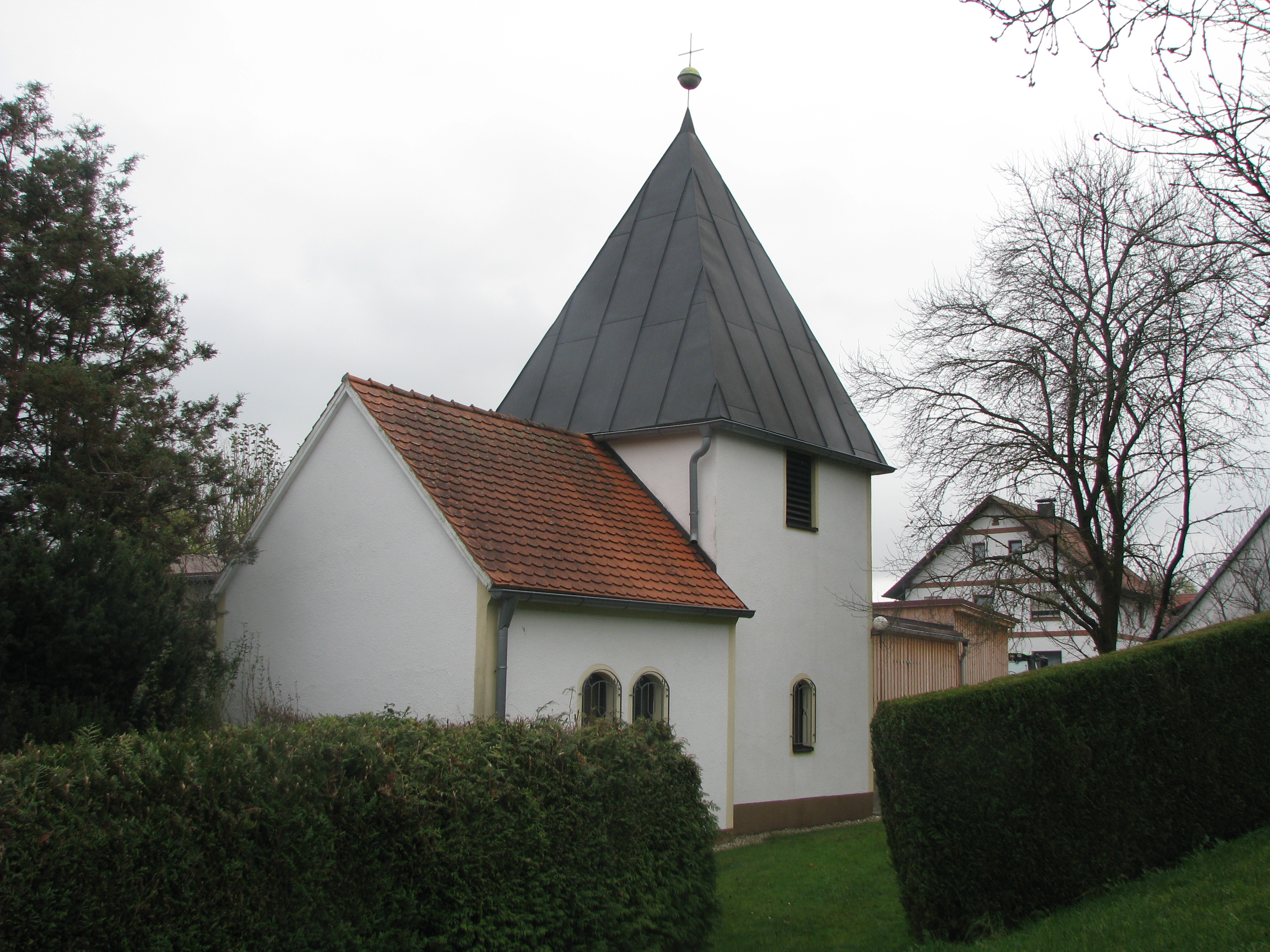 Haslach, Ortsteil von Berg bei Neumarkt in der Oberpfalz, Kapelle des Dorfes